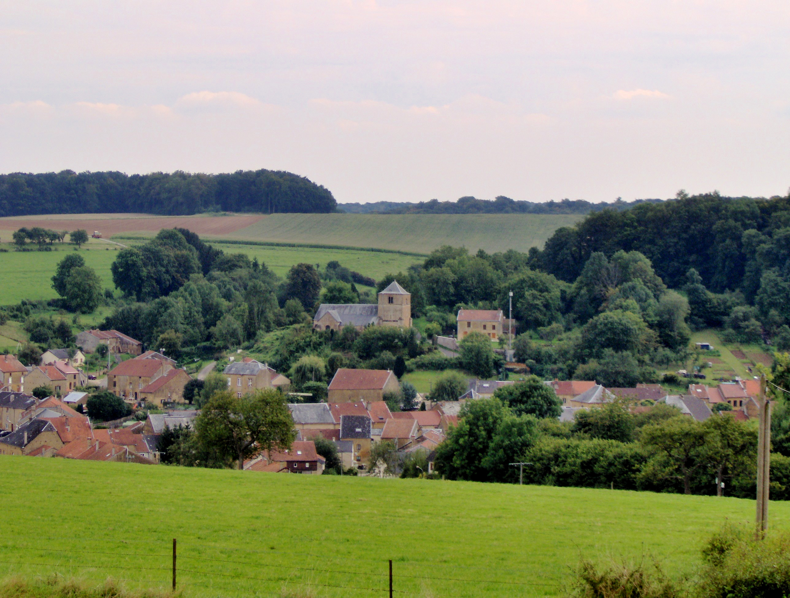 Commune de Sapogne, Ardennes, France